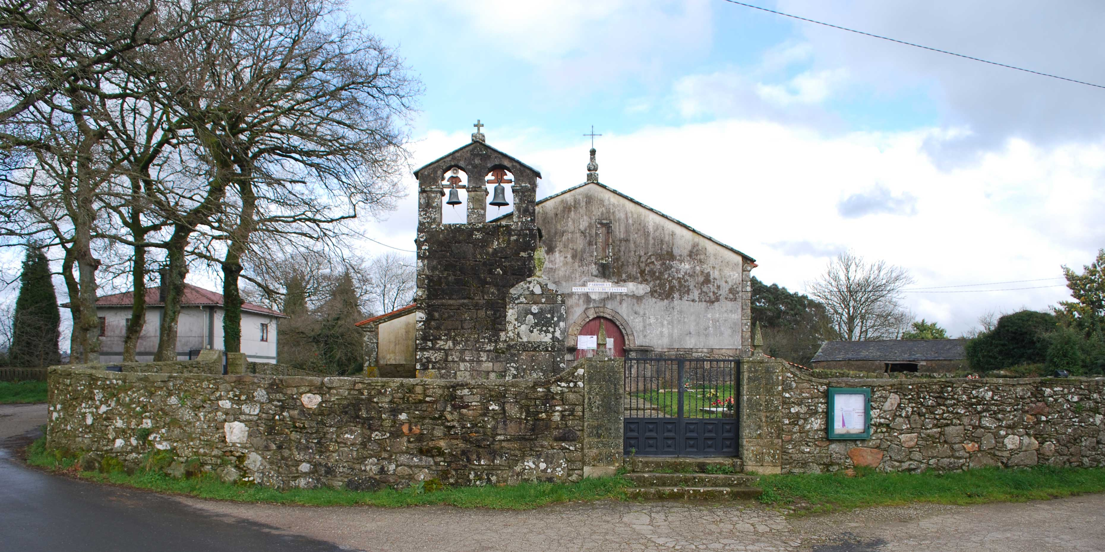 Igrexa de Fisteus